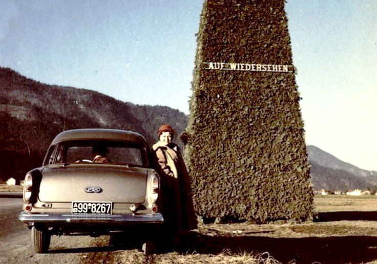 Ford Taunus 12 mit Besatzungs-Kennzeichen